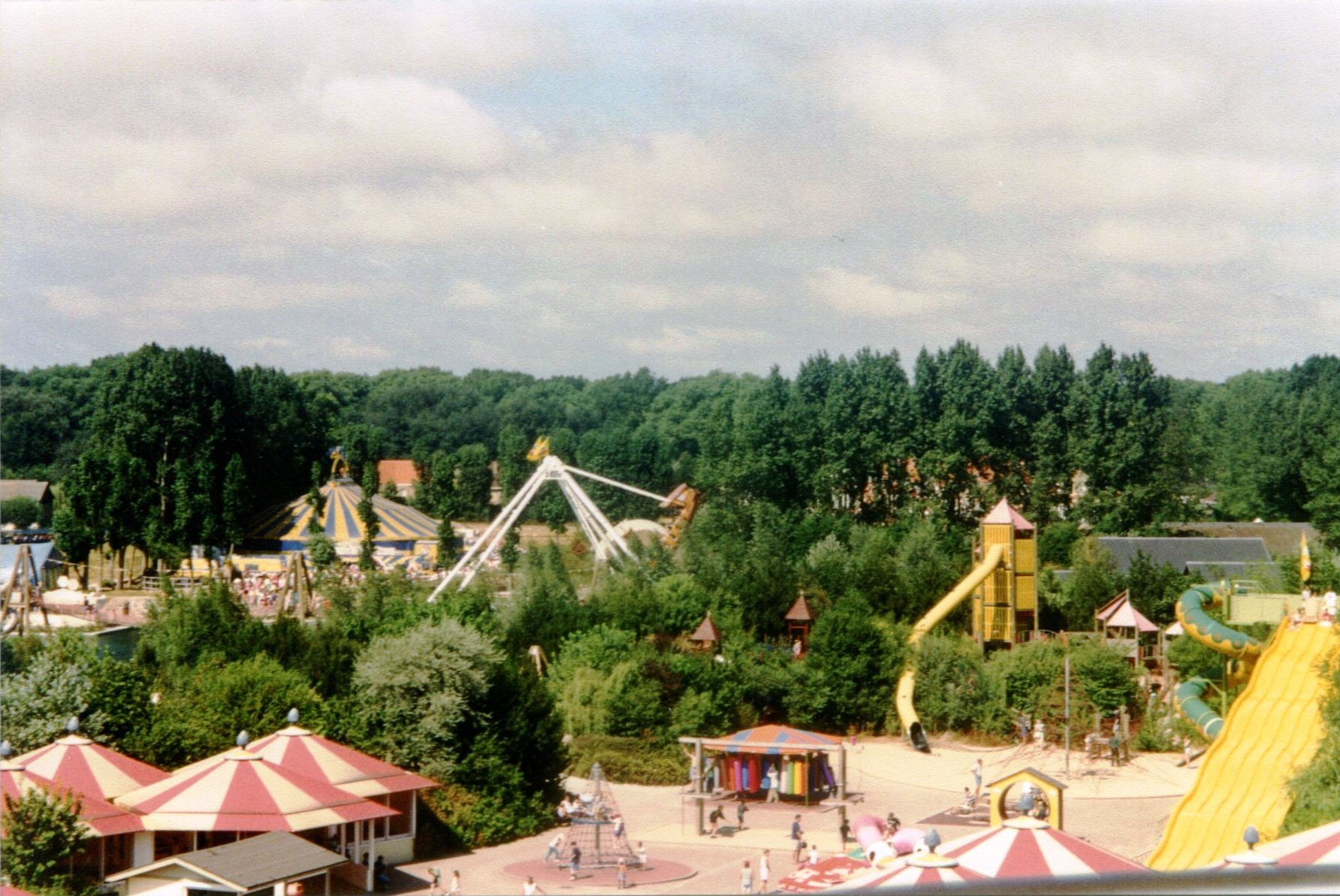 MeliparkCariocaPanorama